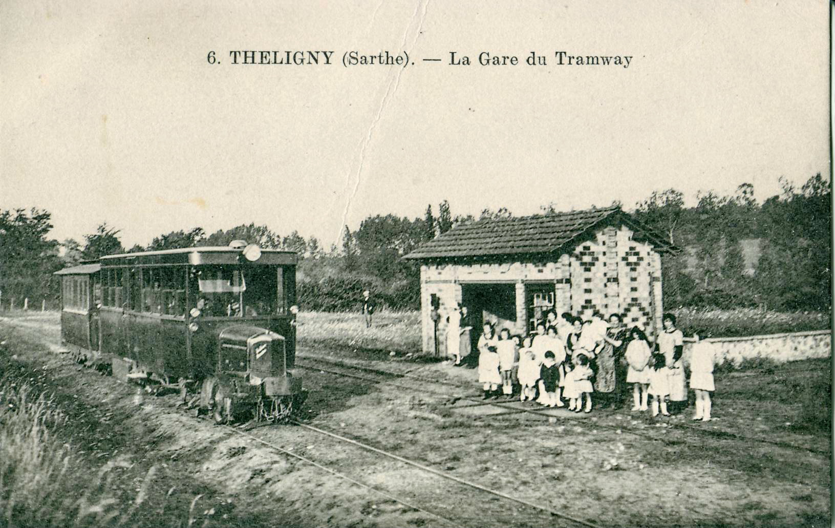 Carte postale, sans mention d'éditeur, n°6THELIGNY (Sarthe) - La gare du TramwayIl s'agit d'une automotrice De Dion-Bouton type JM, carrossée par Carel et Fouché, livrée en 1924 (automotrice B201) ou 1925 (automotrice B202) aux Tramways de la Sarthe